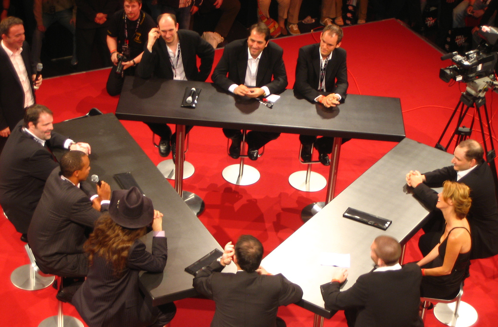 Team fulltilt, palladium - cologne